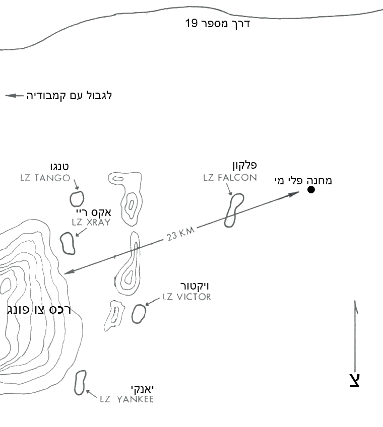 מפת זירת קרב לה דראנג. ללא קנה מידה